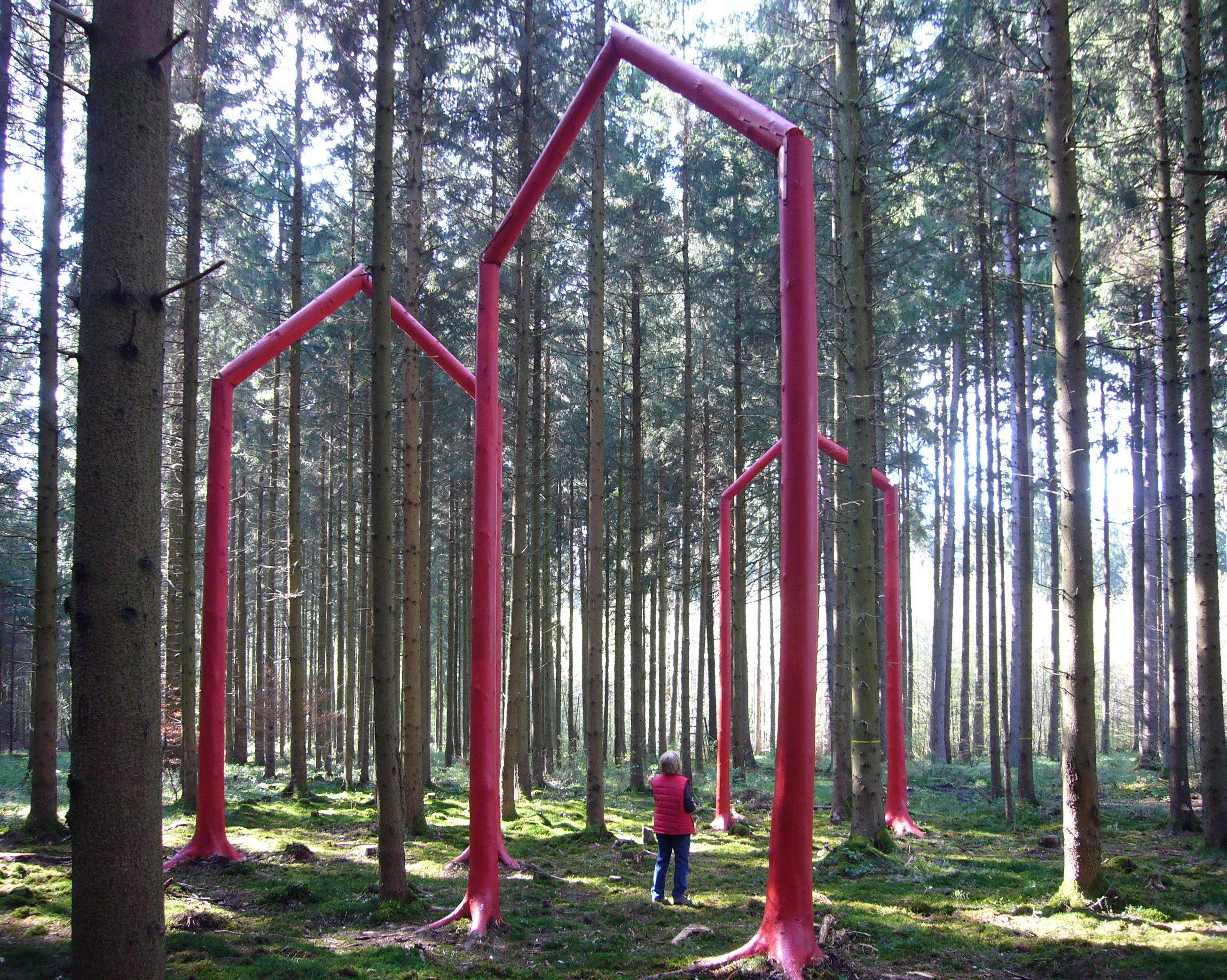 Rainer Devens: Im Forst da wachsen die Häuser